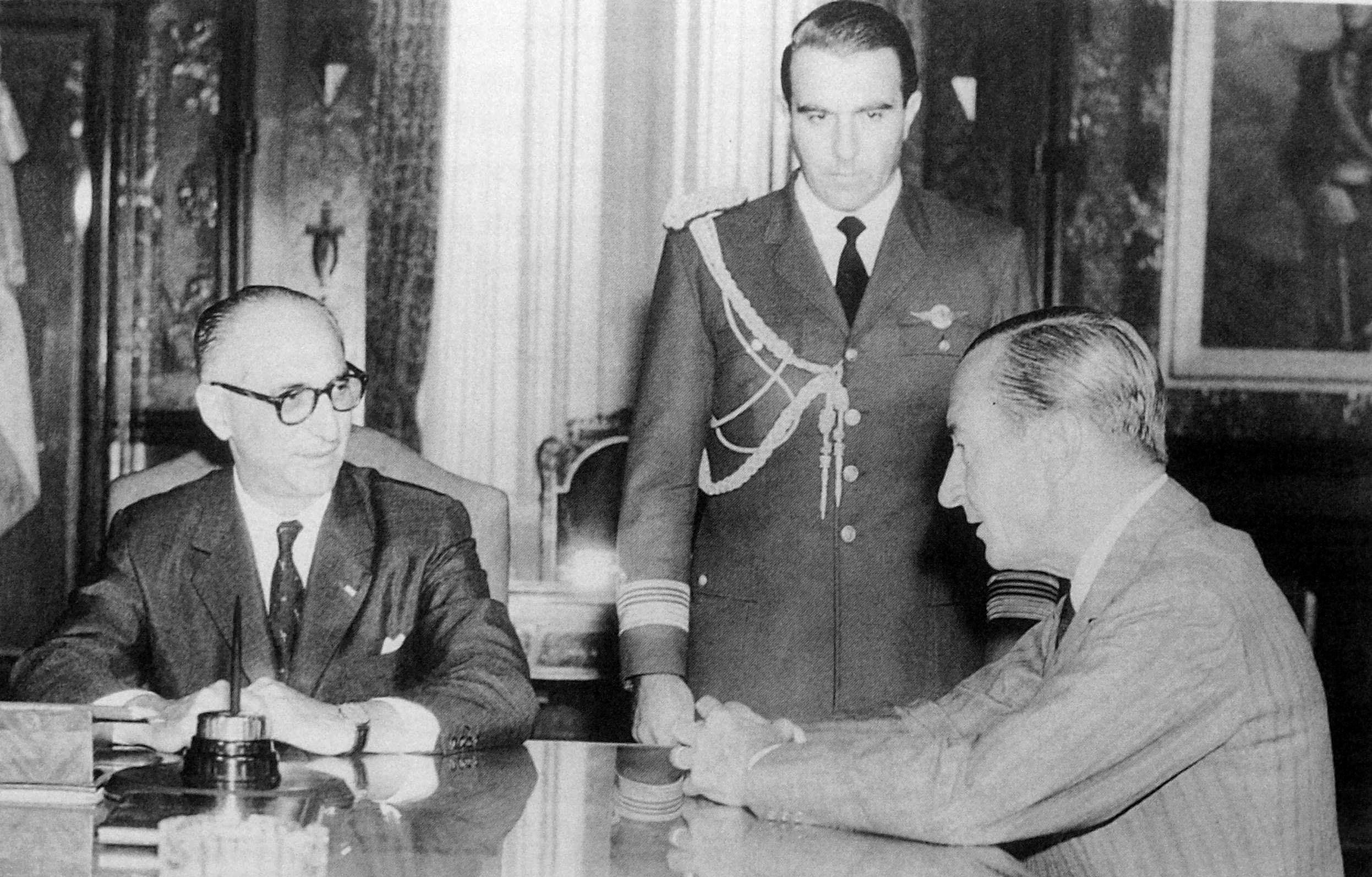 Foto del Presidente Frondizi con el militar Aramburu, este último le aconseja a Frondizi a renunciar, para que no vaya preso, cosa que rechazó.